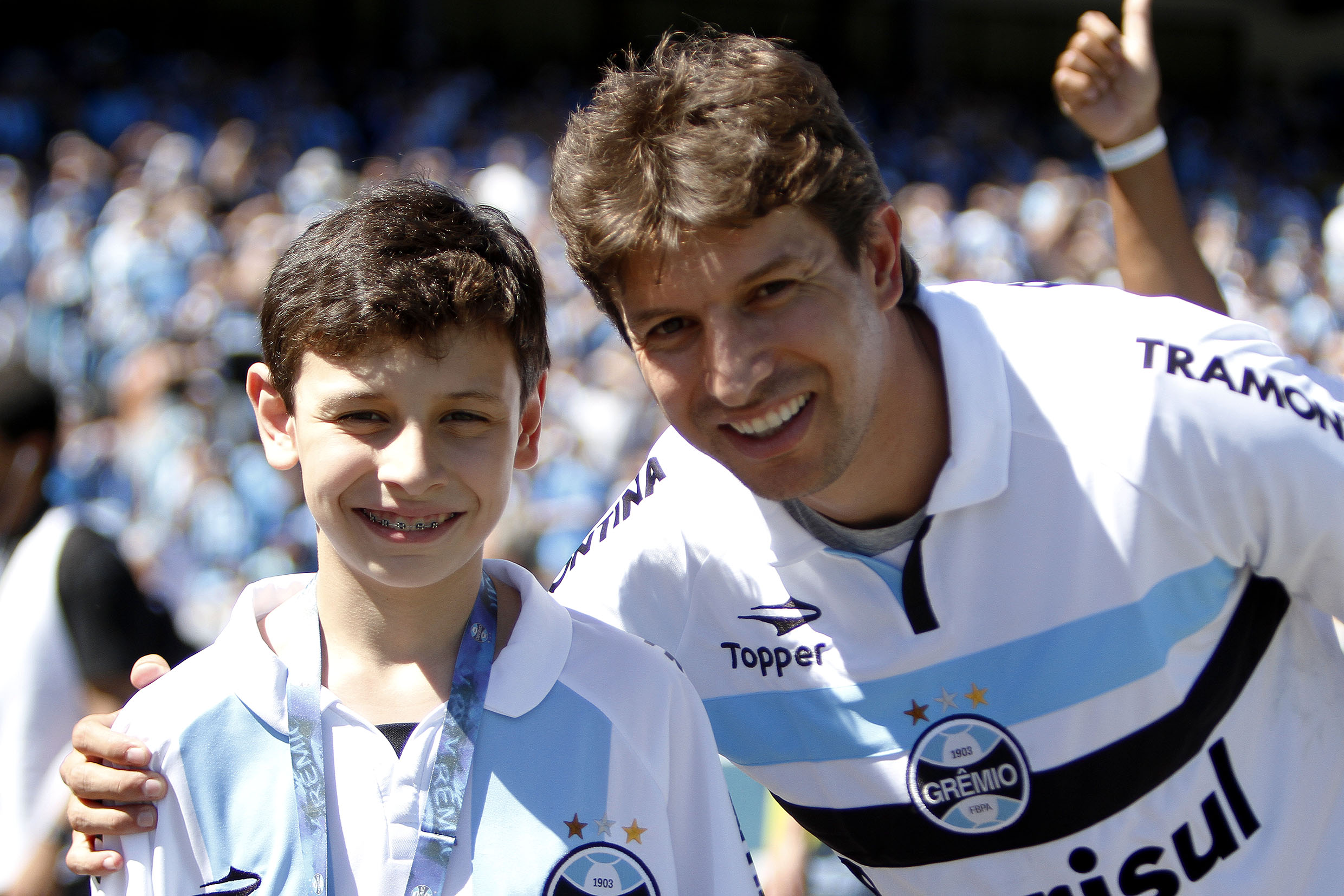 PORTO ALEGRE, RS - FUTEBOL - 02.12.2012 - Tcheco durante a homenagem do Grêmio para os seus jogadores antes do GRENAL deste domingo, as 17h, no último jogo do Estádio Olímpico. A equipe tricolor se despede do velho Monumental para jogar na Arena Porto-Alegrense a partir do próximo final de semana, dia 08, numa partida amistosa contra o Hamburgo-ALE. Foto: Guilherme Testa